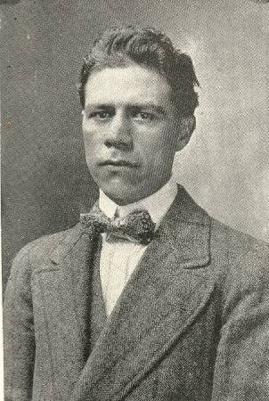 Fotografía del compositor santandereano